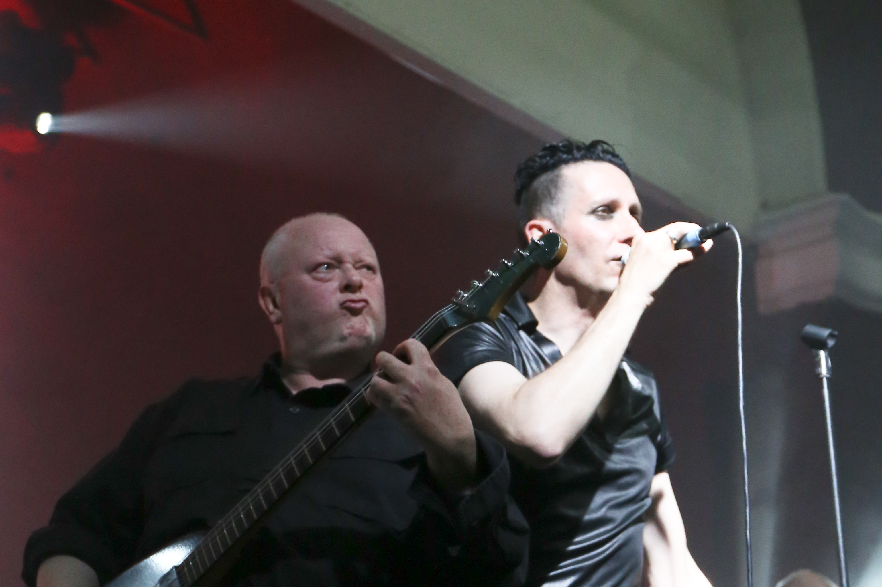 The House of Usher auf dem Wave-Gotik-Treffen 2016 im Felsenkeller.